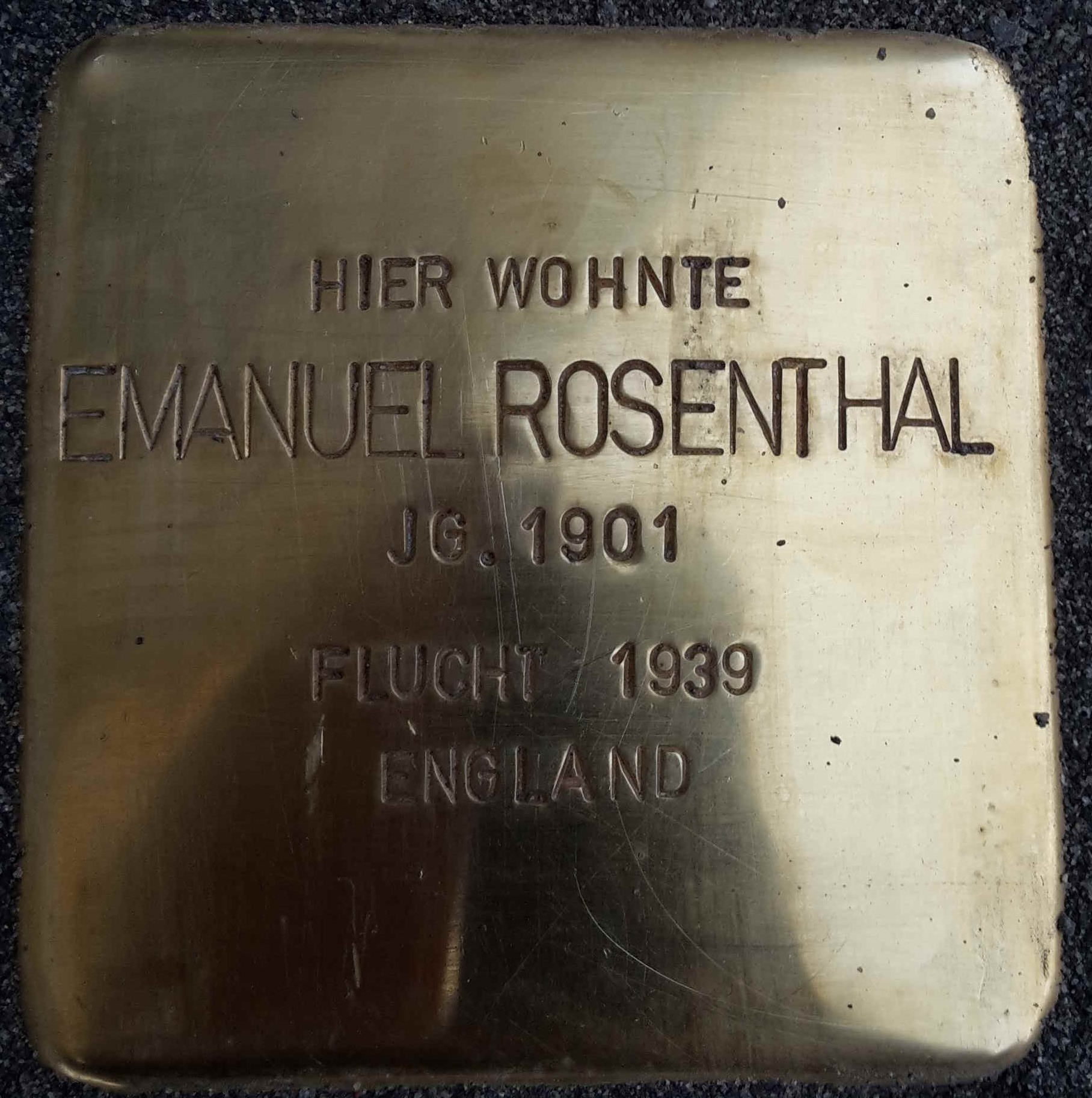 Stolperstein für Emanuel Rosenthal in Neu-Ulm